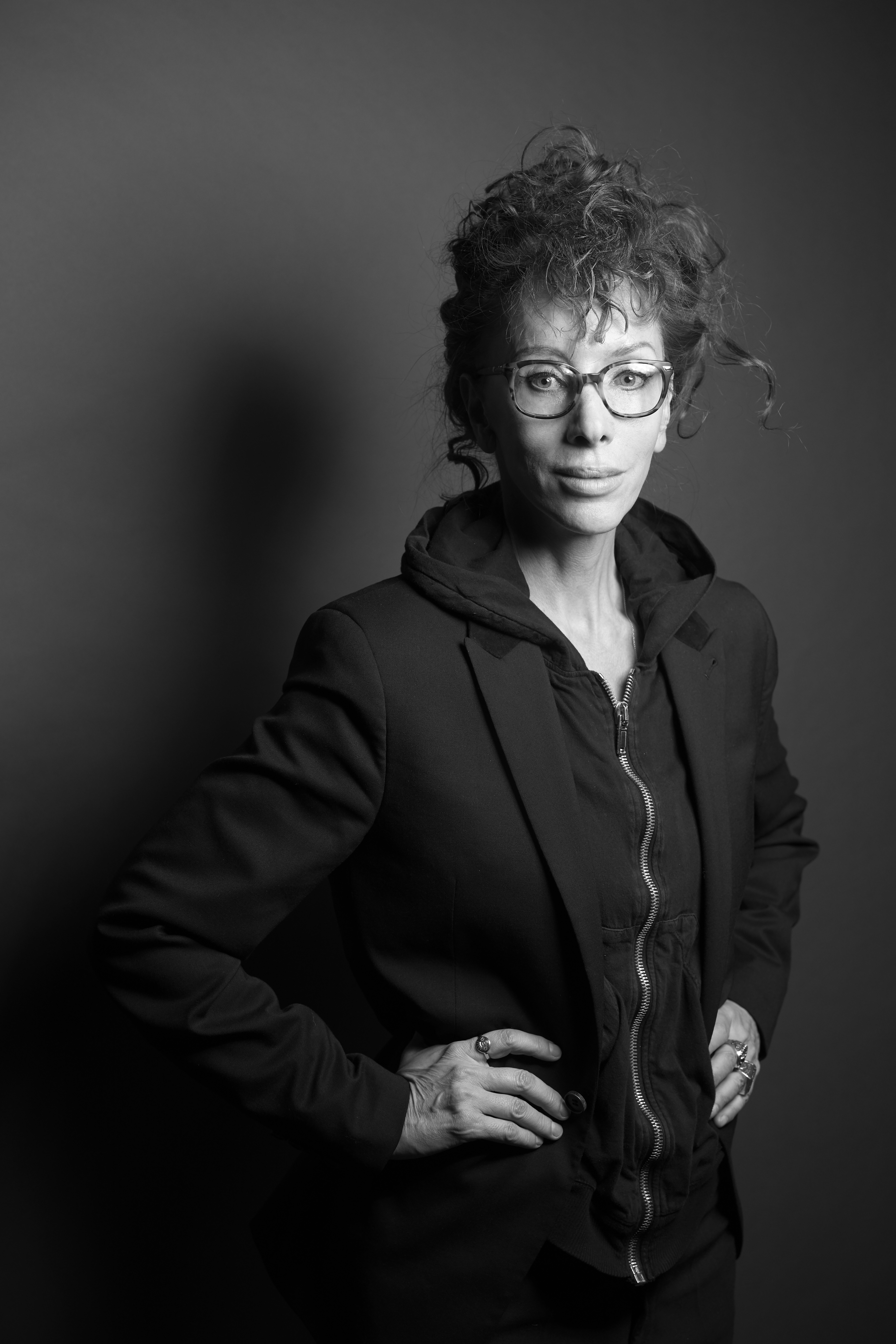 Speakerin Sybille Berg.